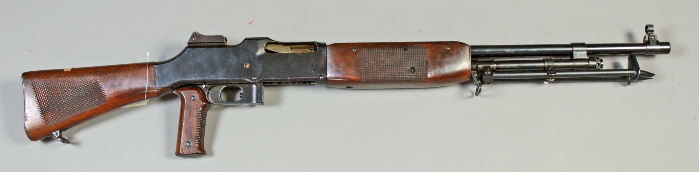 Kulsprutegevär m/1921, system Colt-Browning. Märkt "Colt Automatic machine rifle Model 1919- Cal.6.5 M/M Browning Pat. Feb. 4, 1919 Colt'S Pat. Fire Arms MFG.CO. Hartford, Conn, U.S.A. NO.C-10444". Riktmedel dioptersikte inställbar från 300 till 1200 m.